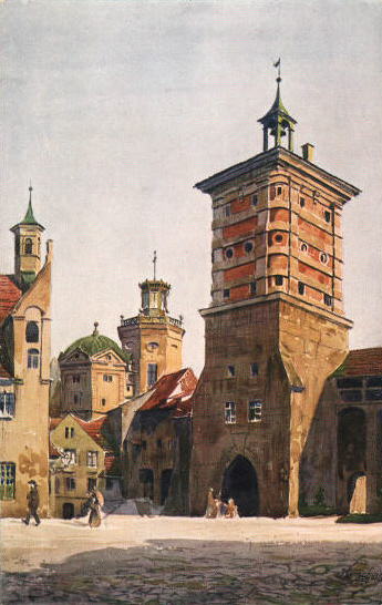 Ansichtskarte von Augsburg, Rotes Tor und Wassertürme